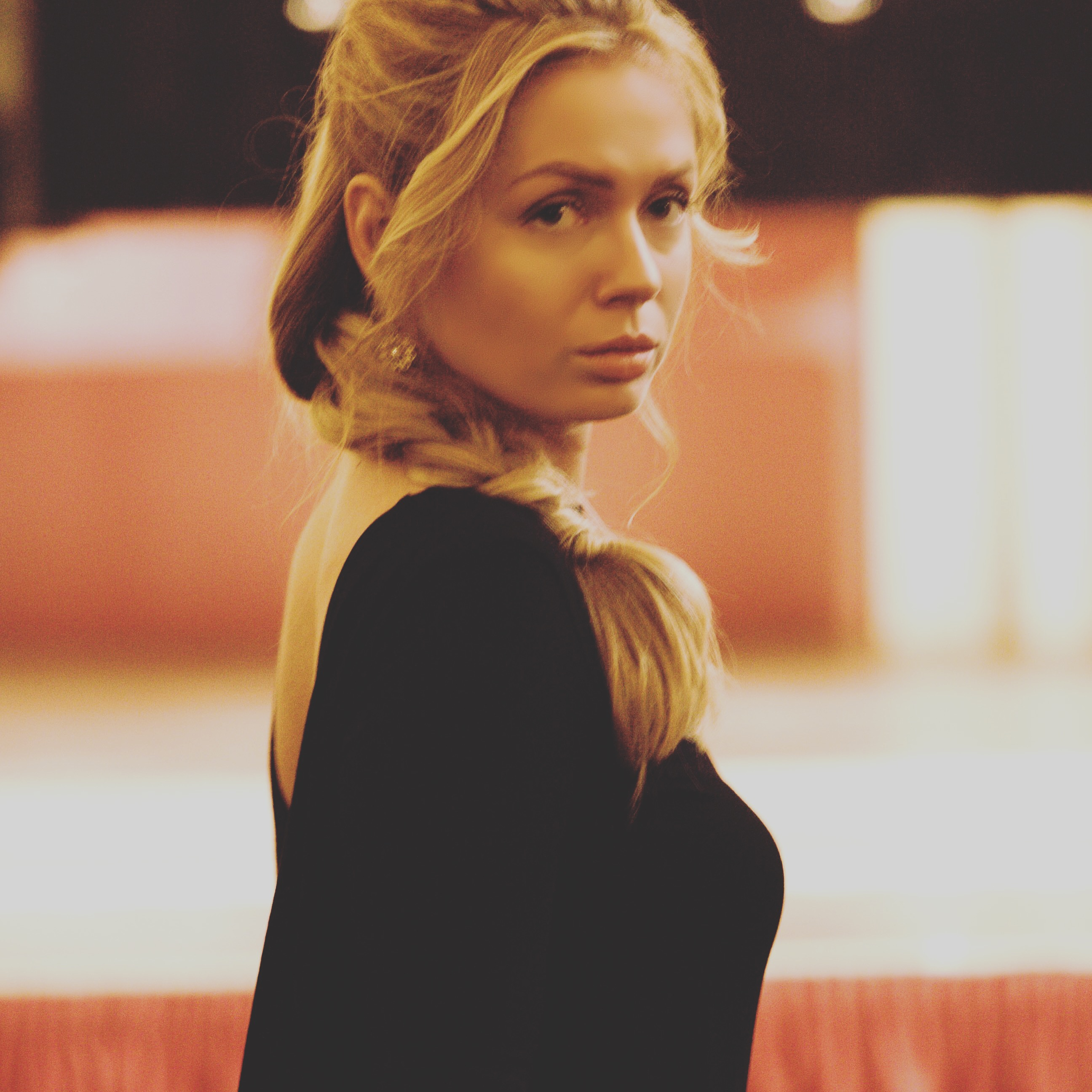 Anastasia Huppmann bei einem Konzert, 2016, Wien